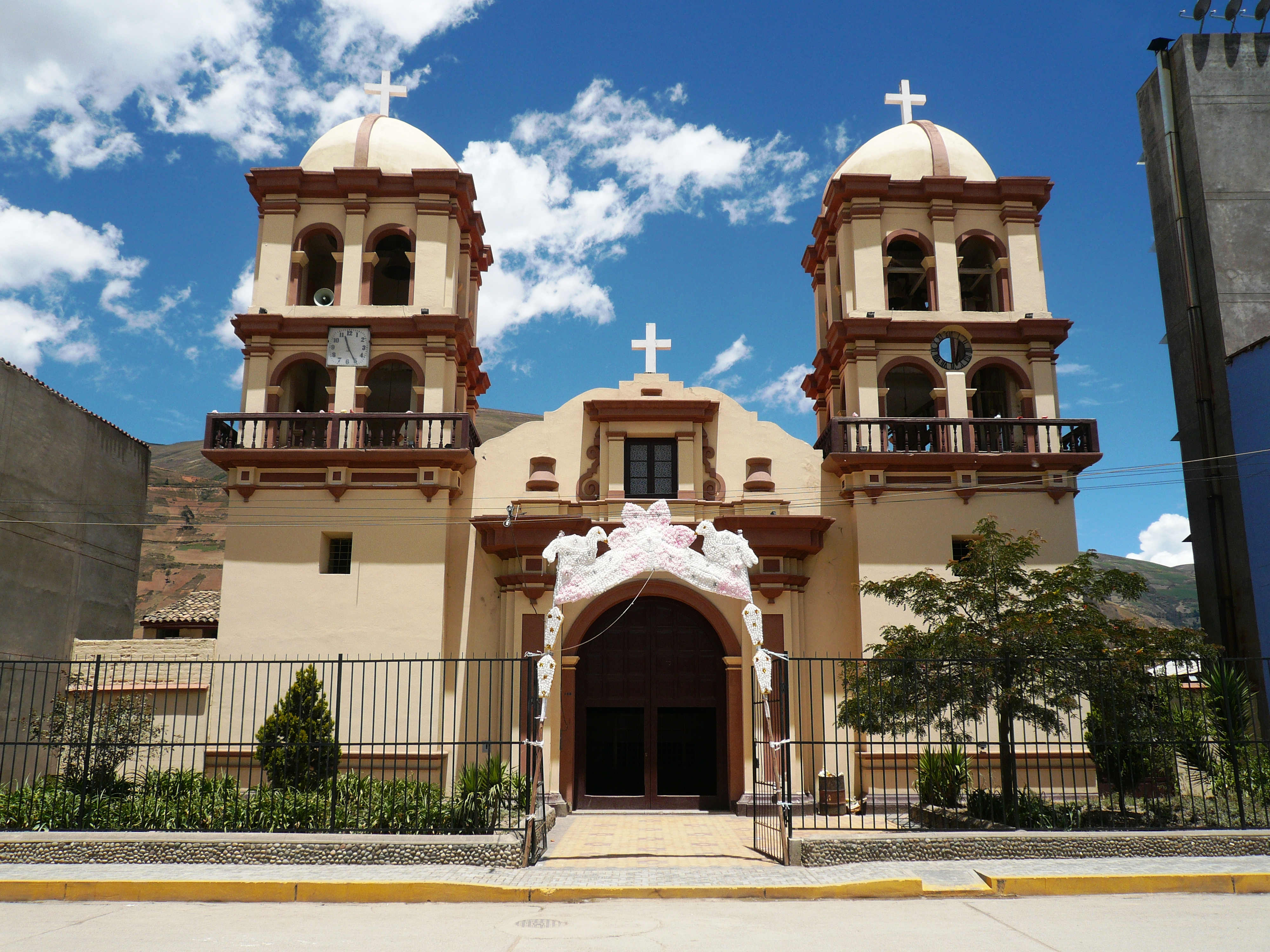 Frontis de la catedral de Pampas - Tayacaja.